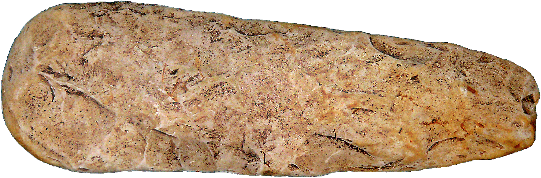 Hache en pierre Auteur : Rv